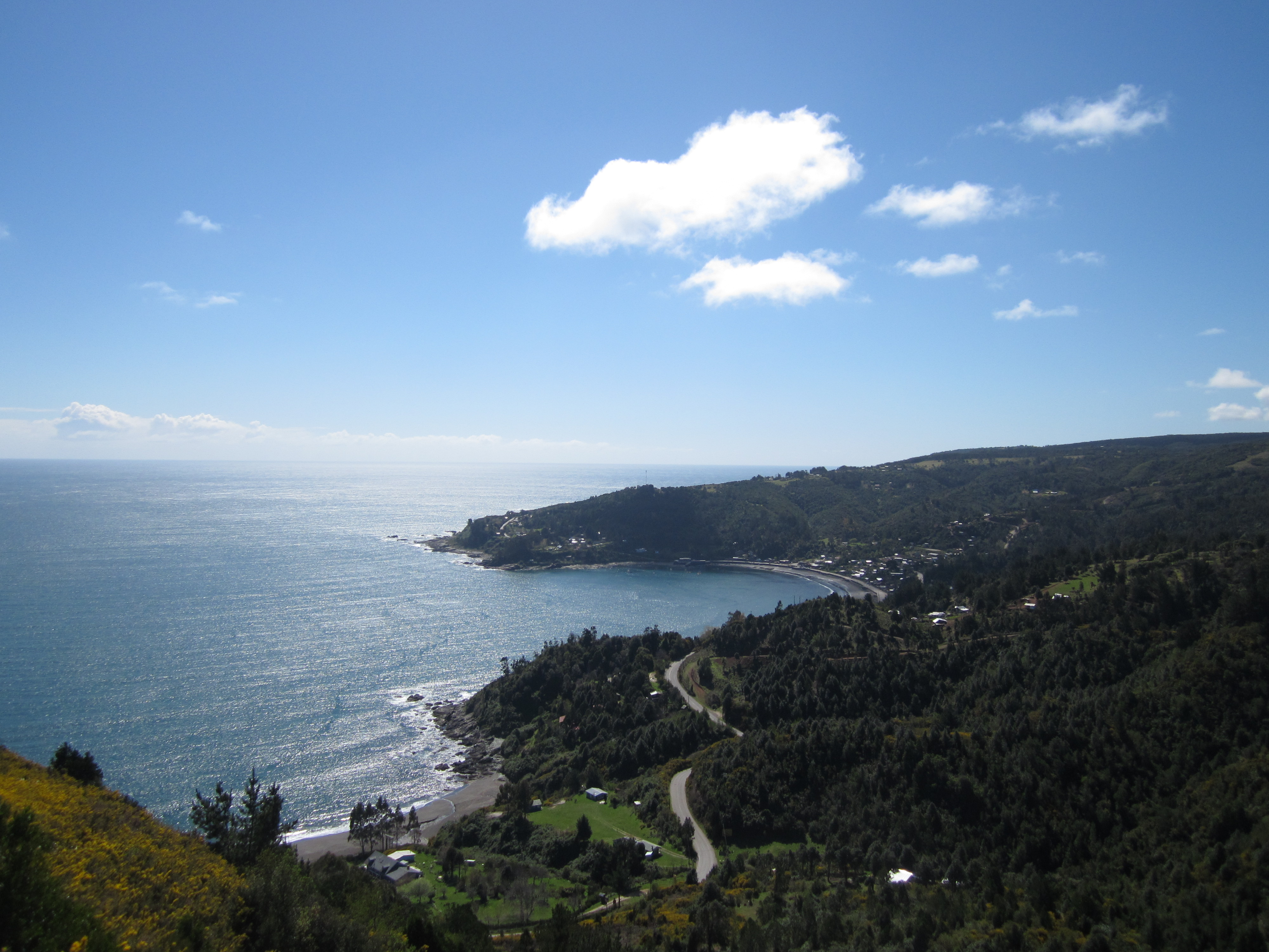 Caleta y playa Los Molinos visto desde el cerro de Niebla.